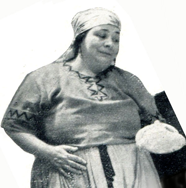 l'attrice italiana Olga Capri in Bertoldo, Bertoldino e Cacasenno (Simonelli, 1936)